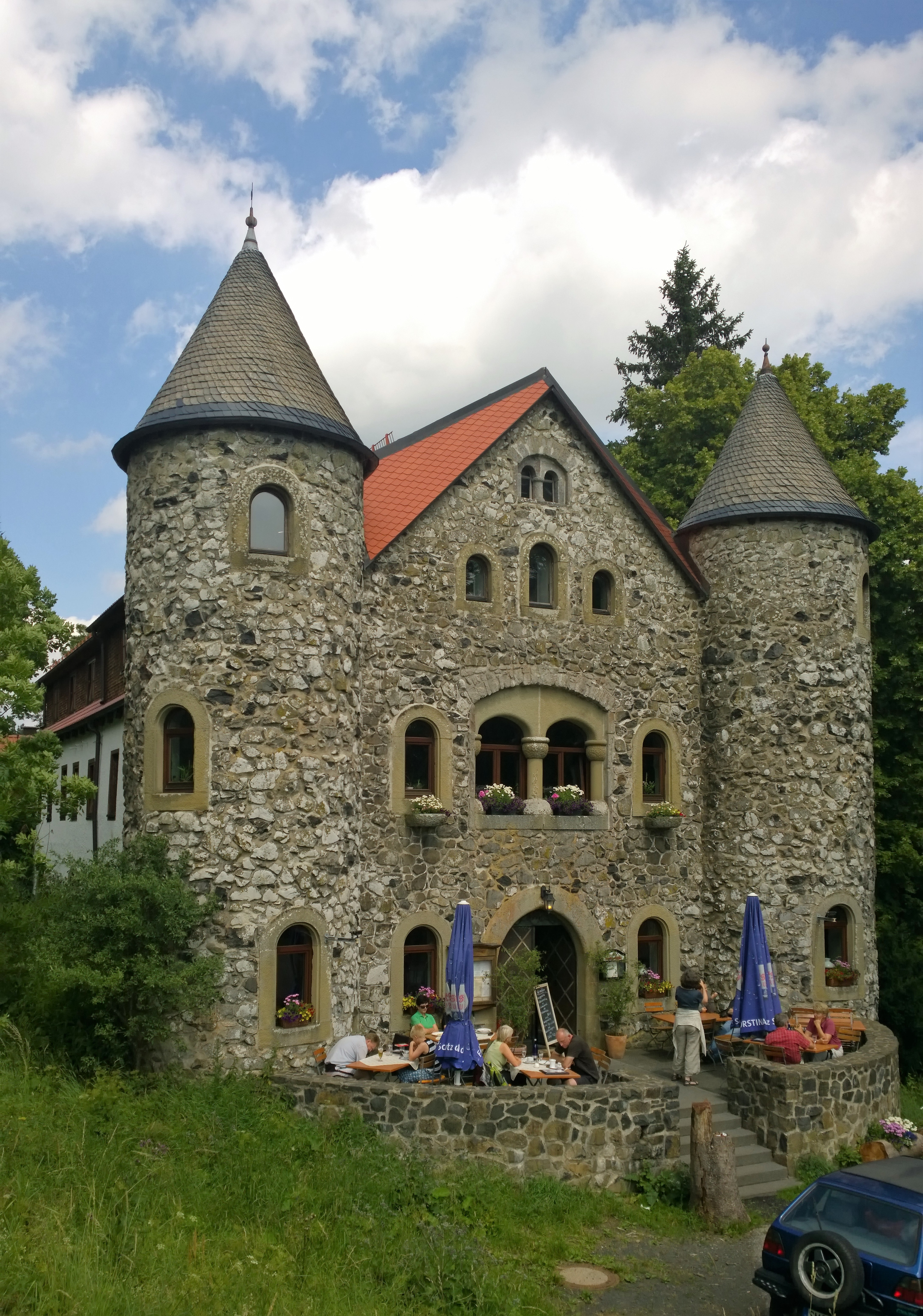 Jagdschloss Holzberg, Südseite des neoromanischen Neubaus von 1910